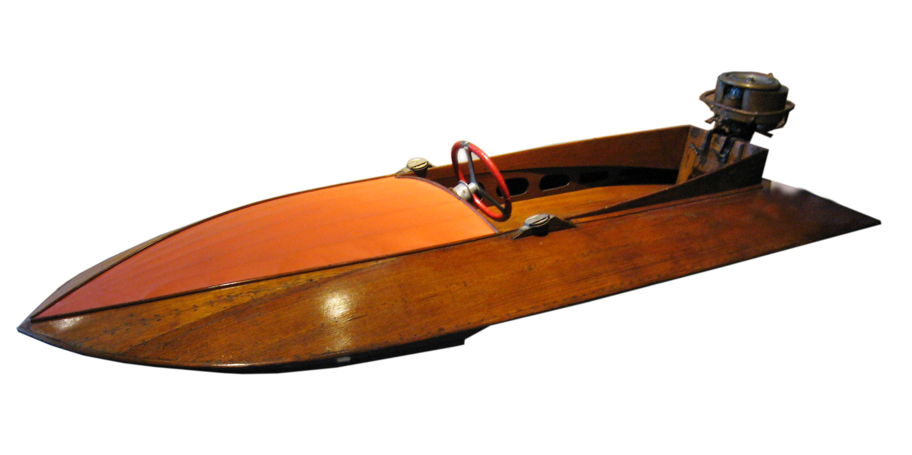 Sportboot German Museum of Technology Native nameDeutsches Technikmuseum BerlinLocationBerlinCoordinates52° 29′ 55″ N, 13° 22′ 39″ E Established1983Web page control : Q706530 VIAF: 150642200 ISNI: 0000 0001 0121 6426 LCCN: n97103087 GND: 2162237-1 SUDOC: 075899728 WorldCat institution QS:P195,Q706530